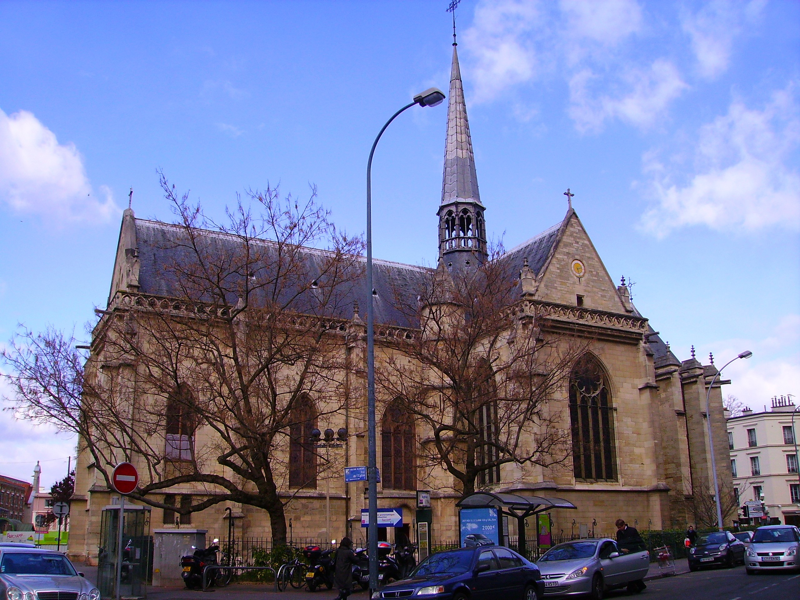 Église Notre-Dame de Boulogne à Boulogne-Billancourt